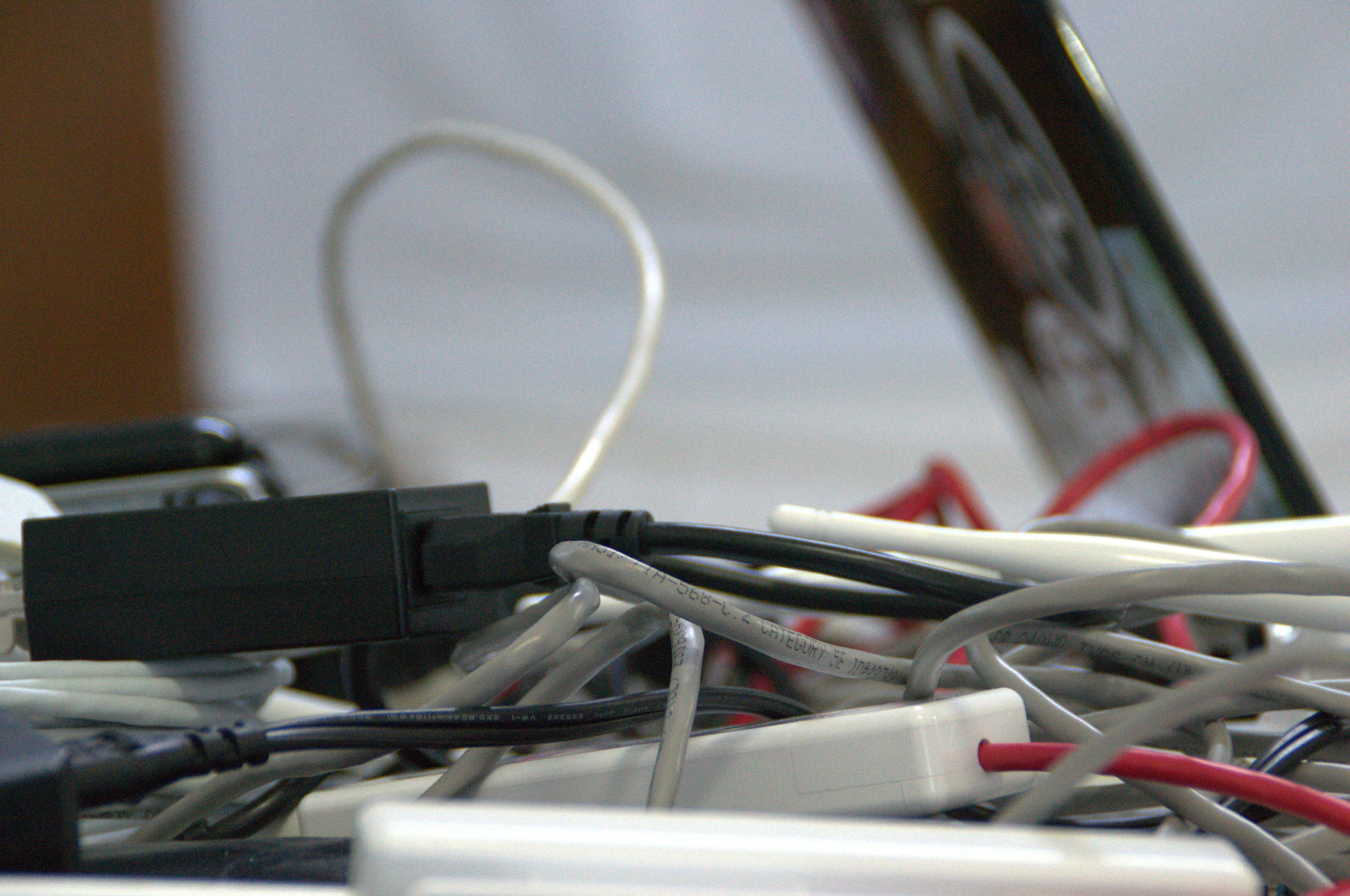 Atelier pour l'installation et la configuration d'un Mesh Networking dans la ville de Sayada en Tunisie